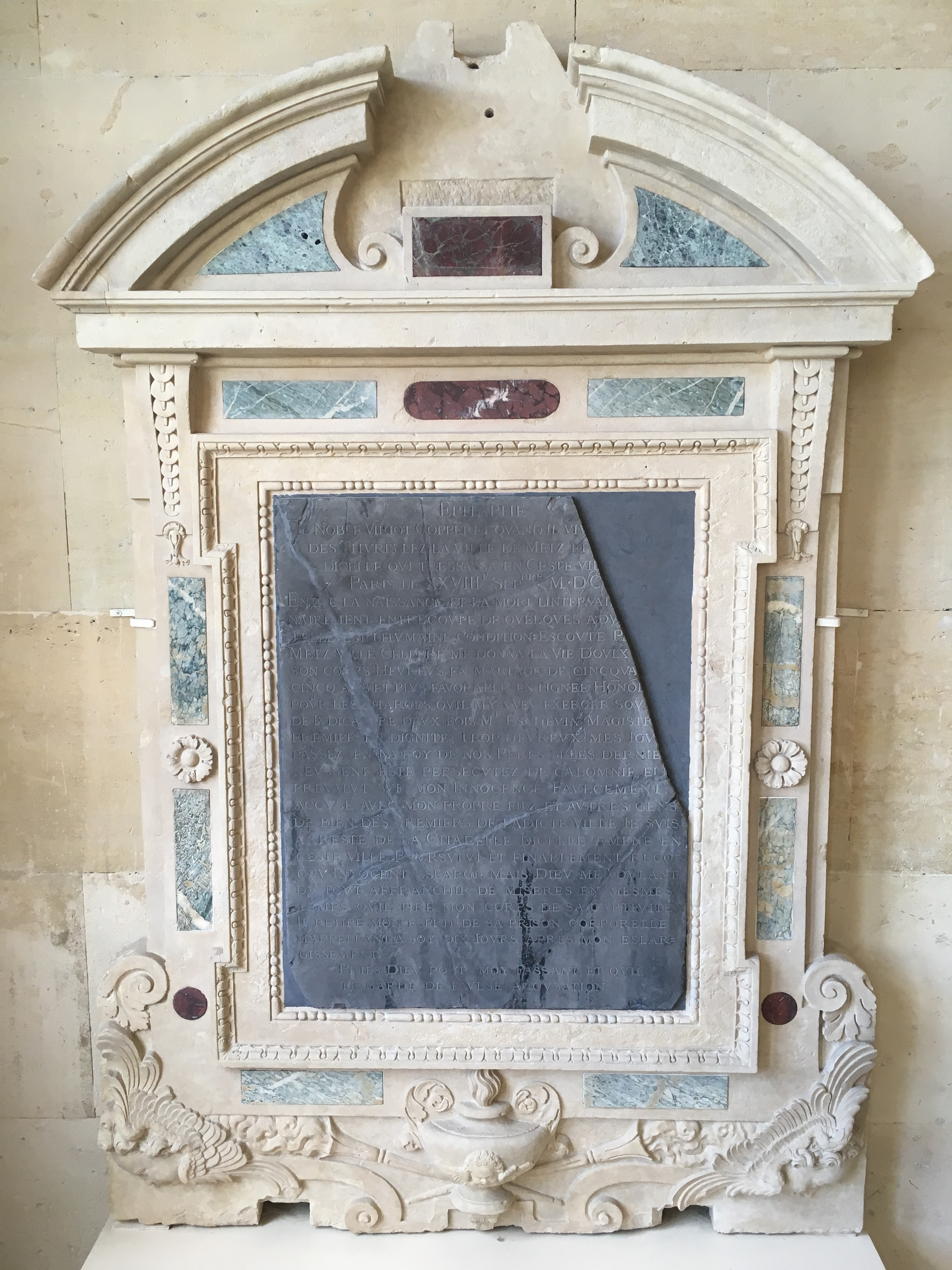 Zacharie I Normain, Epitaphe de Viriot Copperet, après 1601, provenant des Célestins. Ecouen, musée national de la Renaissance.